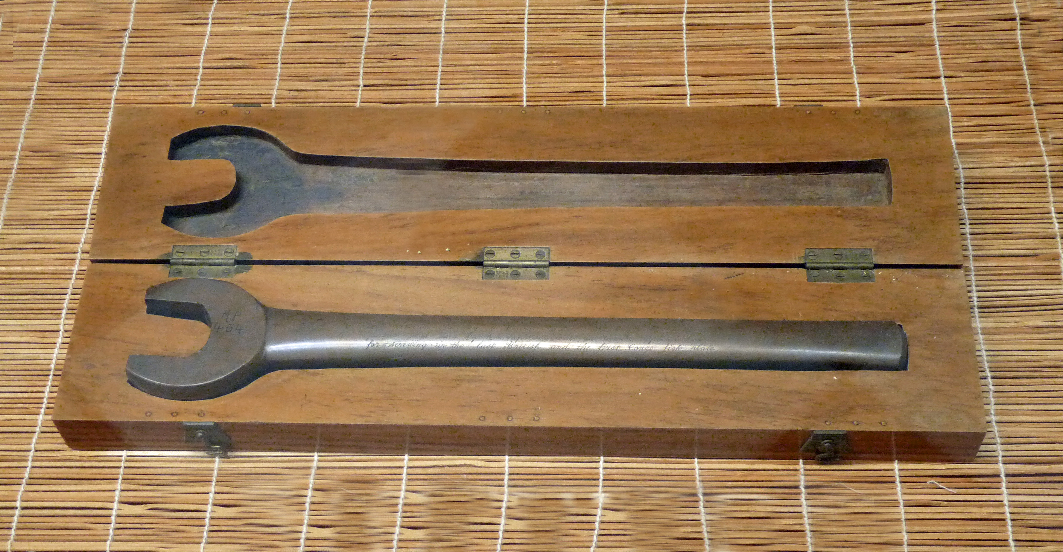 Serre-écrou en cuivre, fabriqué à l'usine de Lumumbashi, que le colonel Wangermée utilisa le 11 décembre 1909 pour serrer les rails reliant le réseau ferré du Katanga à celui de la Rhodésie. Musée royal de l'Afrique centrale